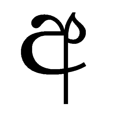 இது சிங்கள අ ஆகும்.